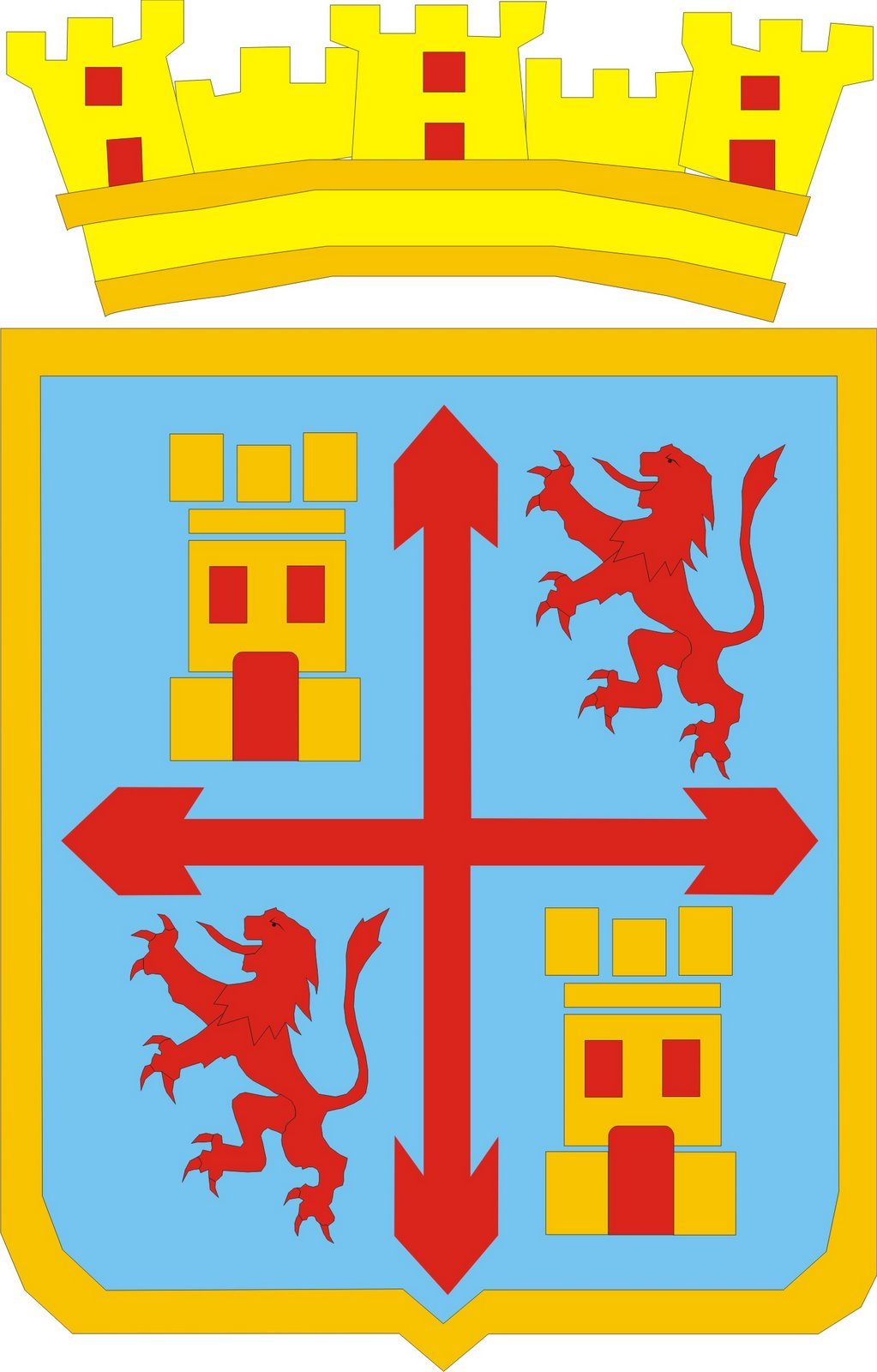 Escudo de Belmez, en Córdoba (España); escudo acuartelado por la cruz de la Orden de Calatrava.